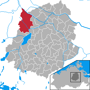 Dargun, Landkreis Demmin, Mecklenburg-Vorpommern